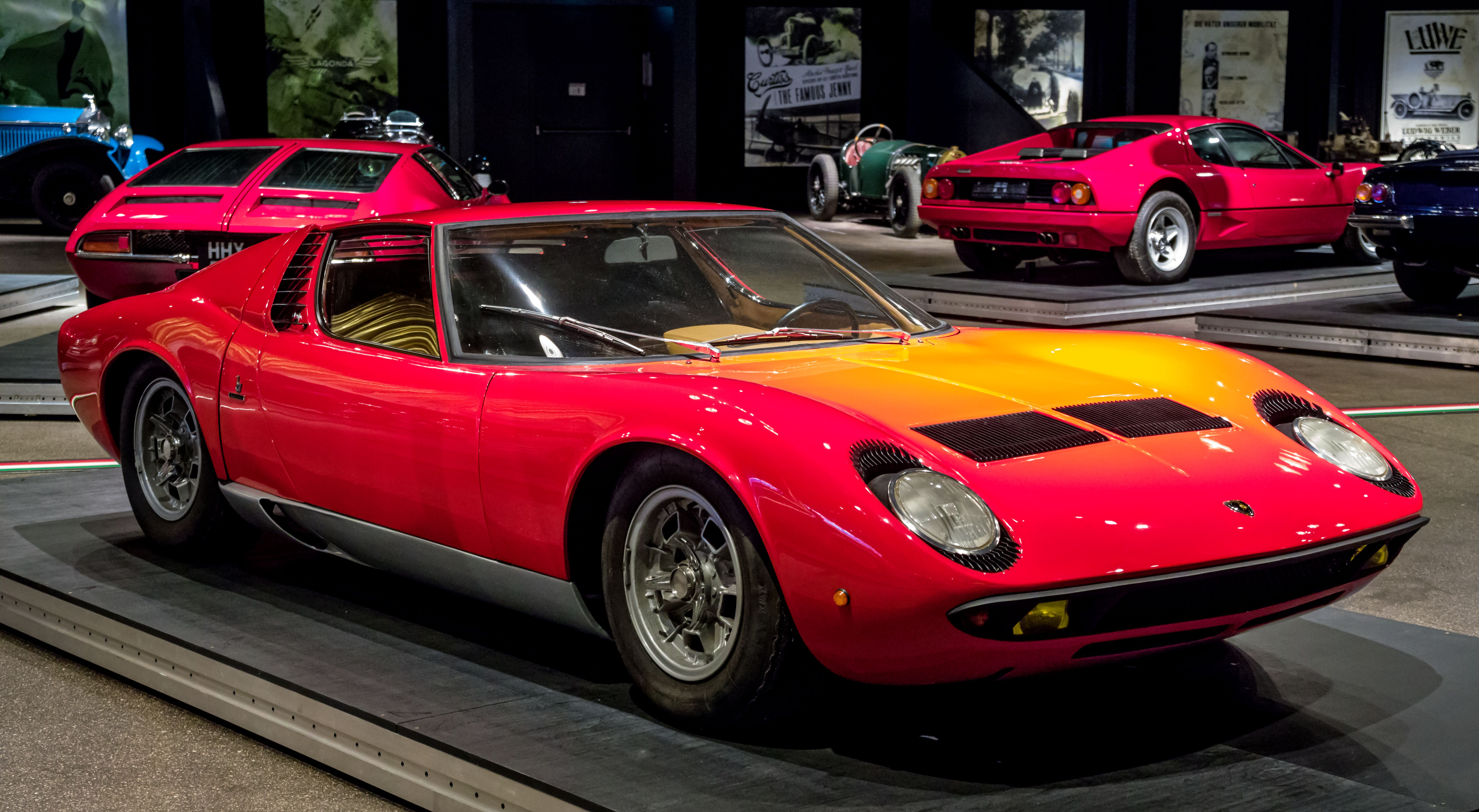 Das Volante Oldtimermuseum in Kirchzarten